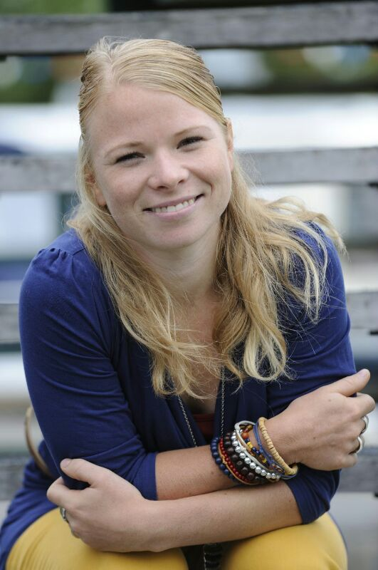 Yvonne Spigt